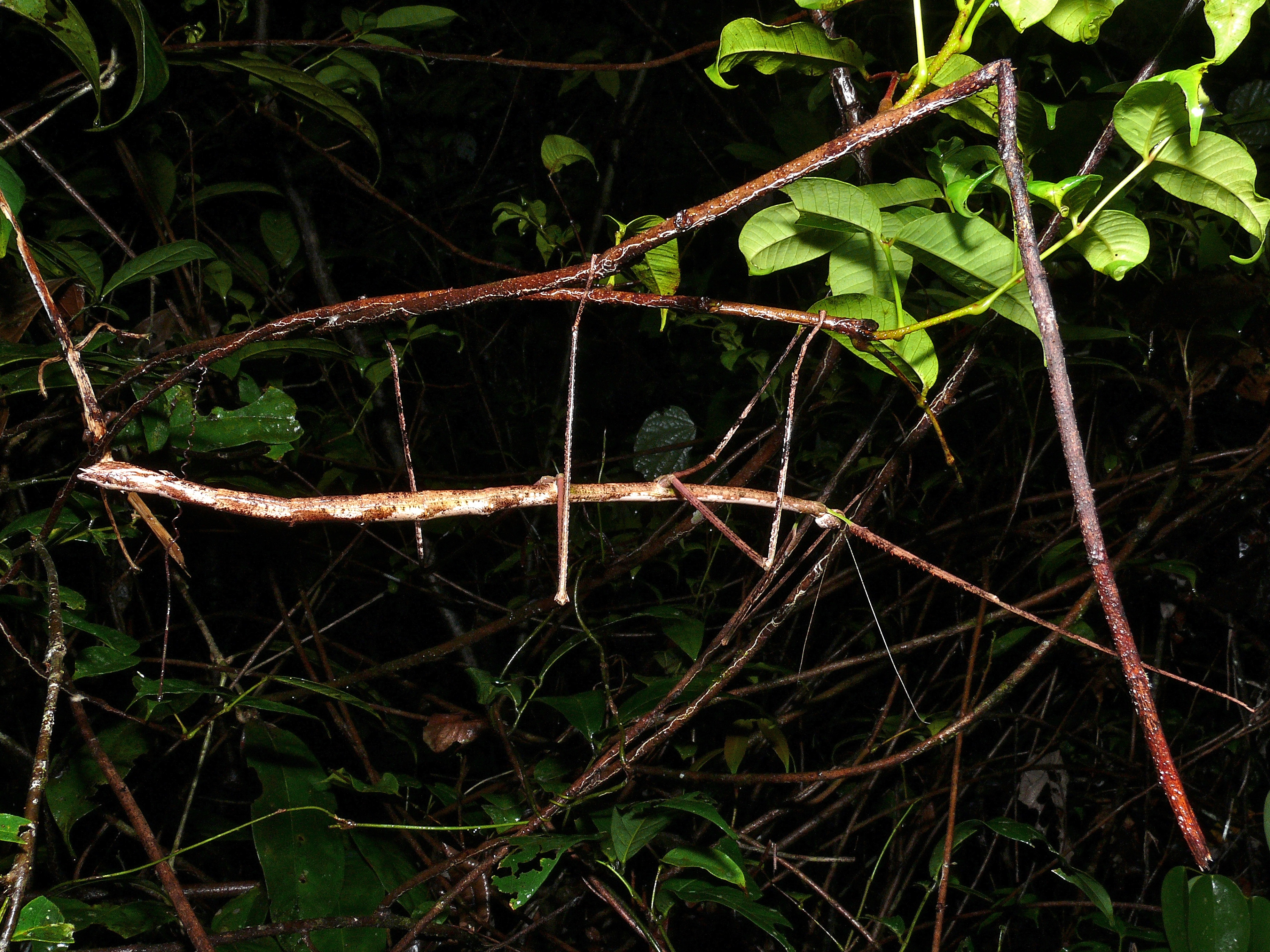 Gunung Mulu NP, Sarawak, MALAYSIA